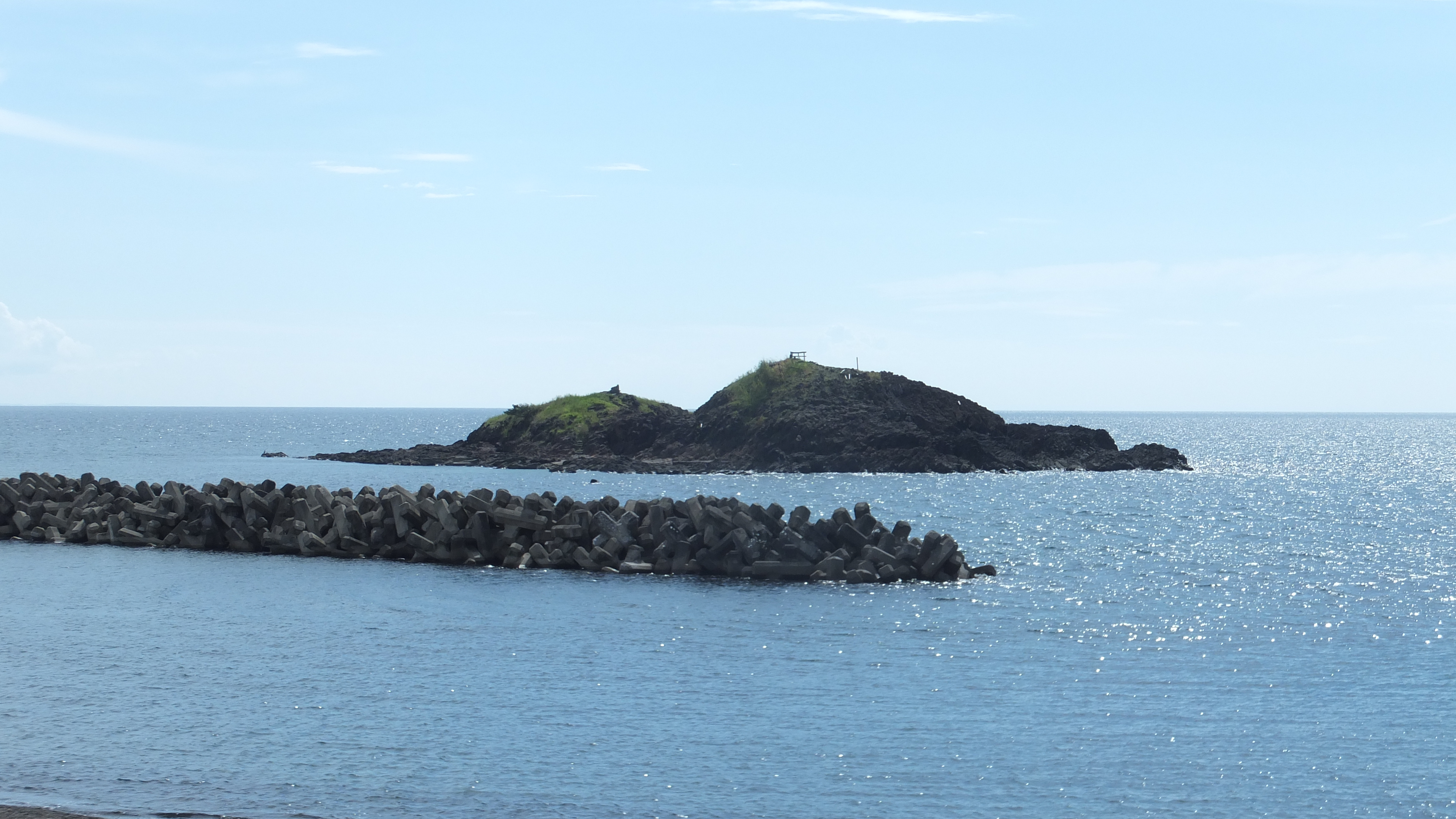 八森地区の沖合に浮かぶ雄島。毎年8月15日に行われる花火大会はここから打ち上げられる。